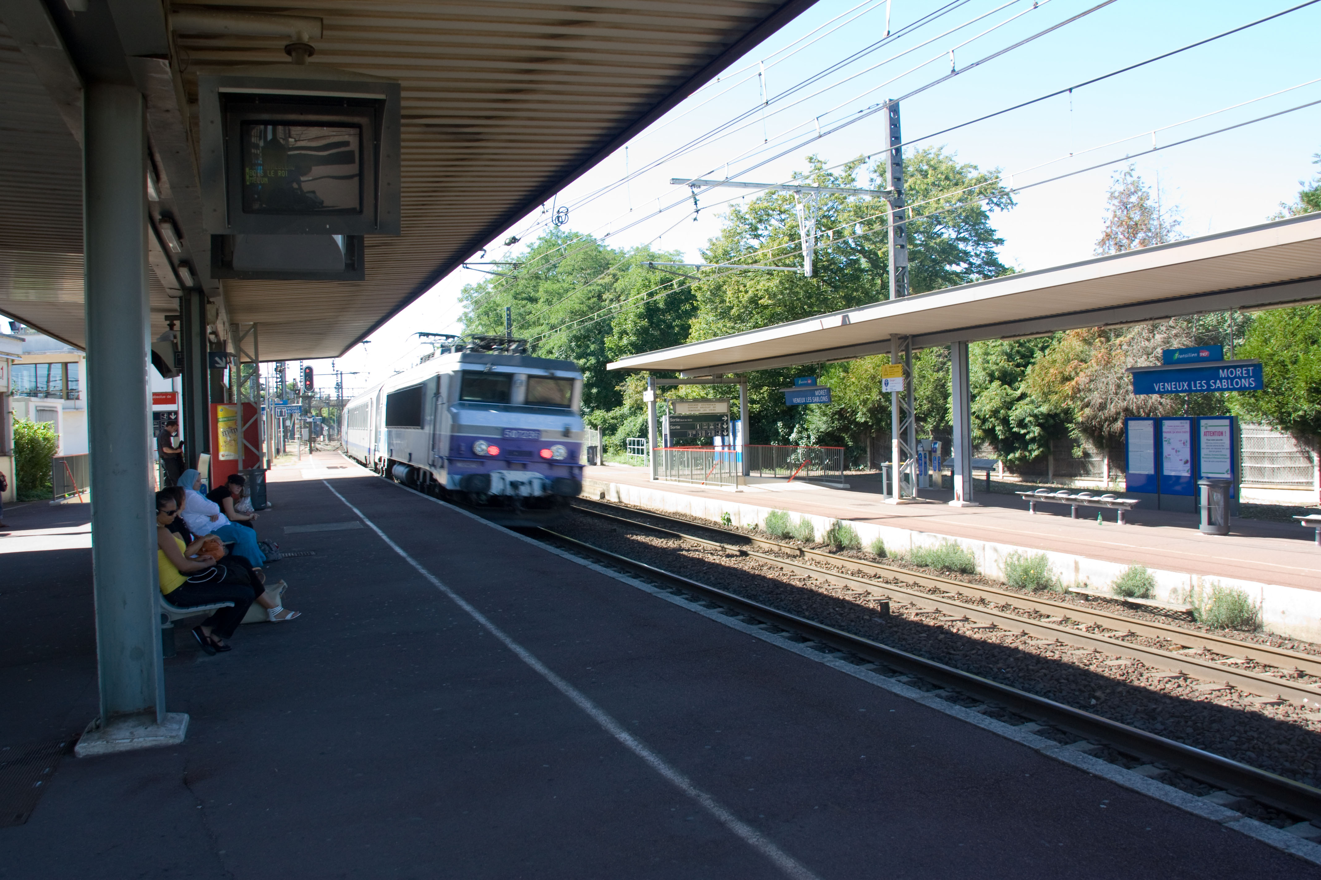 Gare de Moret - Veneux-les-Sablons, Veneux-les-Sablons, Seine-et-Marne, France